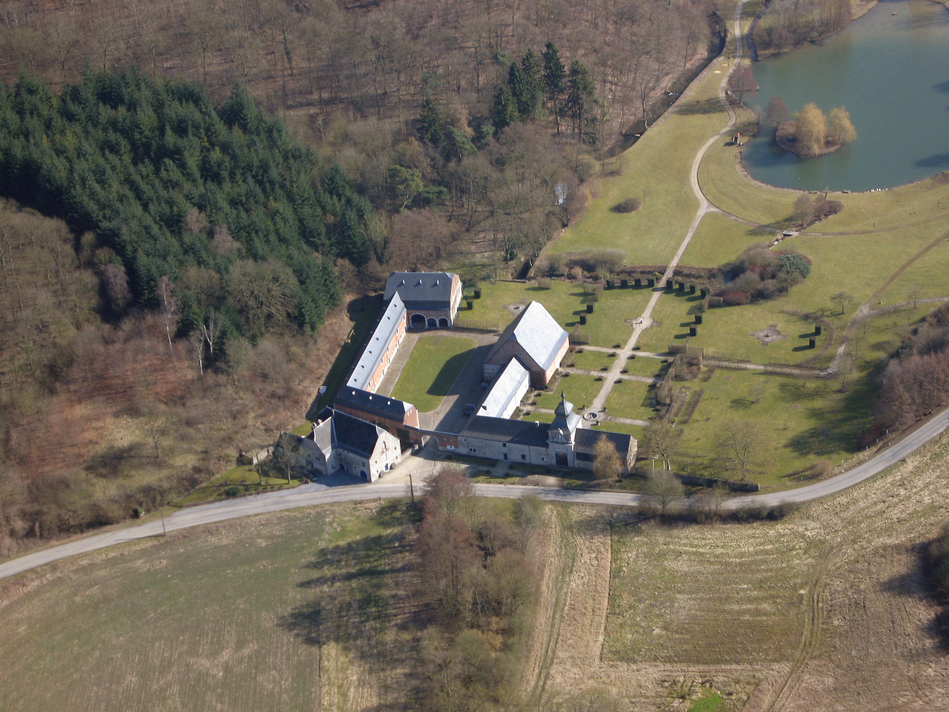 Les façades et les toitures des bâtiments de la ferme de l'Abbaye de Grandpré (M# et ensemble formé par ces bâtiments et les terrains environnants #S)